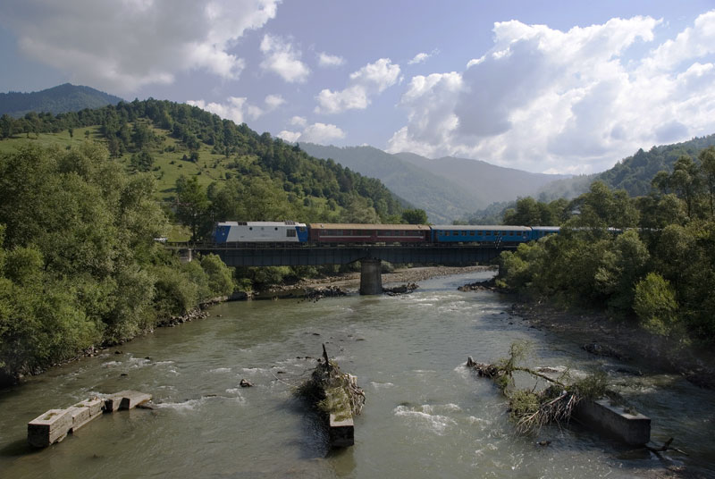 Bistra, Maramureş, Rumänien – Am südlichen Ortsrand quert die Eisenbahnline den Fluss Vişeu